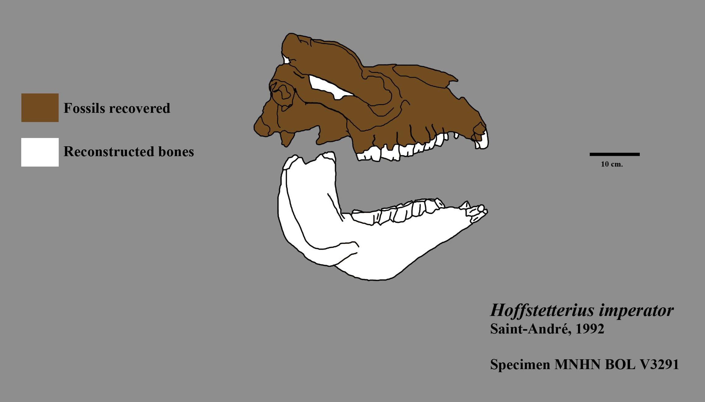 Recreación del cráneo juvenil del toxodóntido Hoffstteterius imperator. Basado en: Saint-Andre, P. A. (1993). Hoffstetterius imperator ng, n. sp. du Miocène supérieur de l'Altiplano bolivien et le statut des Dinotoxodontinés (Mammalia, Notoungulata). Comptes rendus de l'Académie des sciences. Série 2, Mécanique, Physique, Chimie, Sciences de l'univers, Sciences de la Terre, 316(4), 539-545.